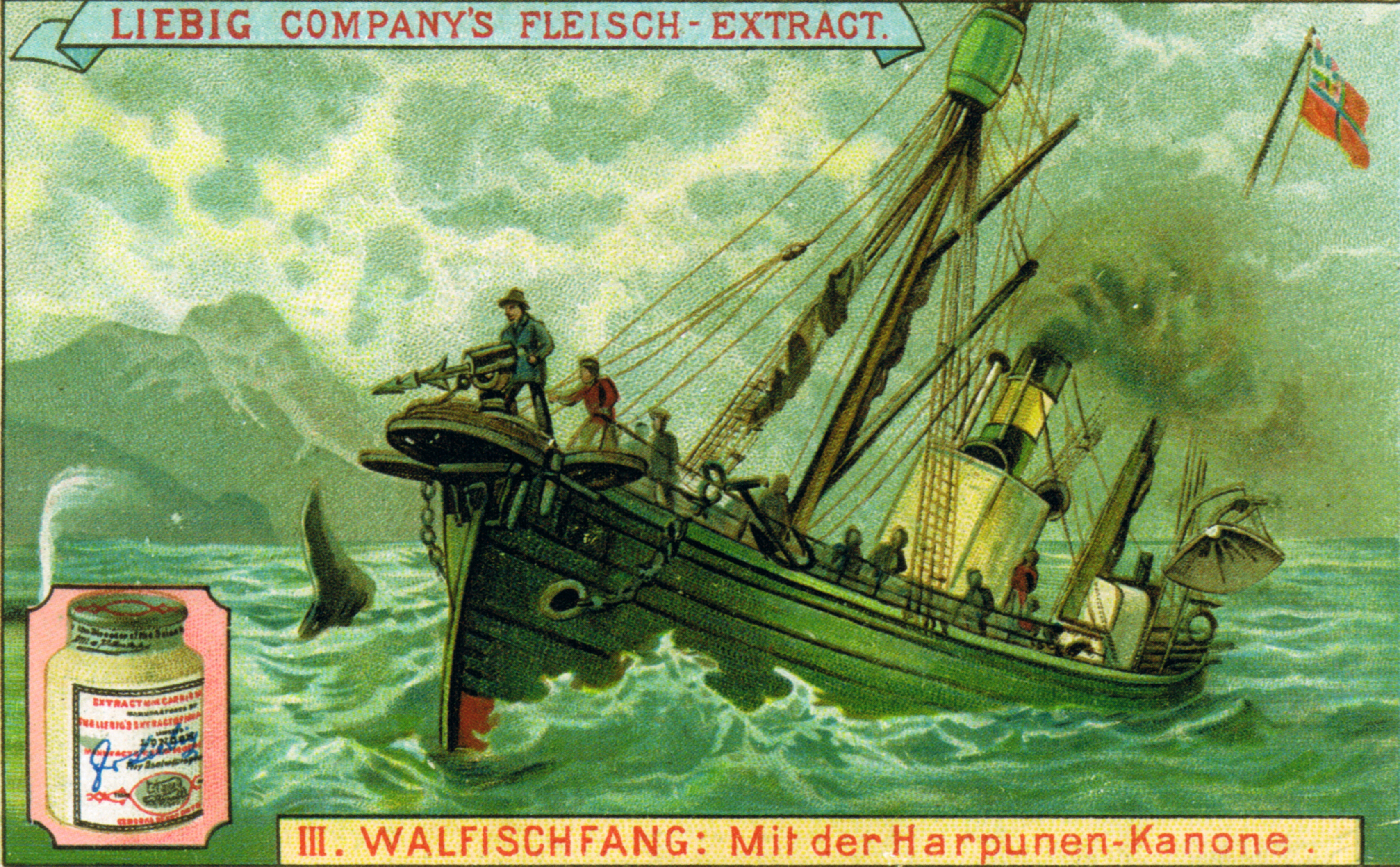 Liebig Extract of Meat - Sammelkarte Walfischfang: Mit der Harpunen Kanone